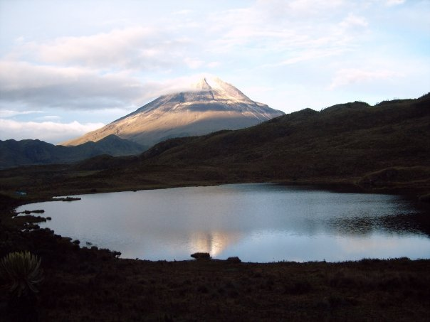 Laguna El Corazón, al fondo Nevado del Tolima. En el municipio de Anzoátegui-Tolima